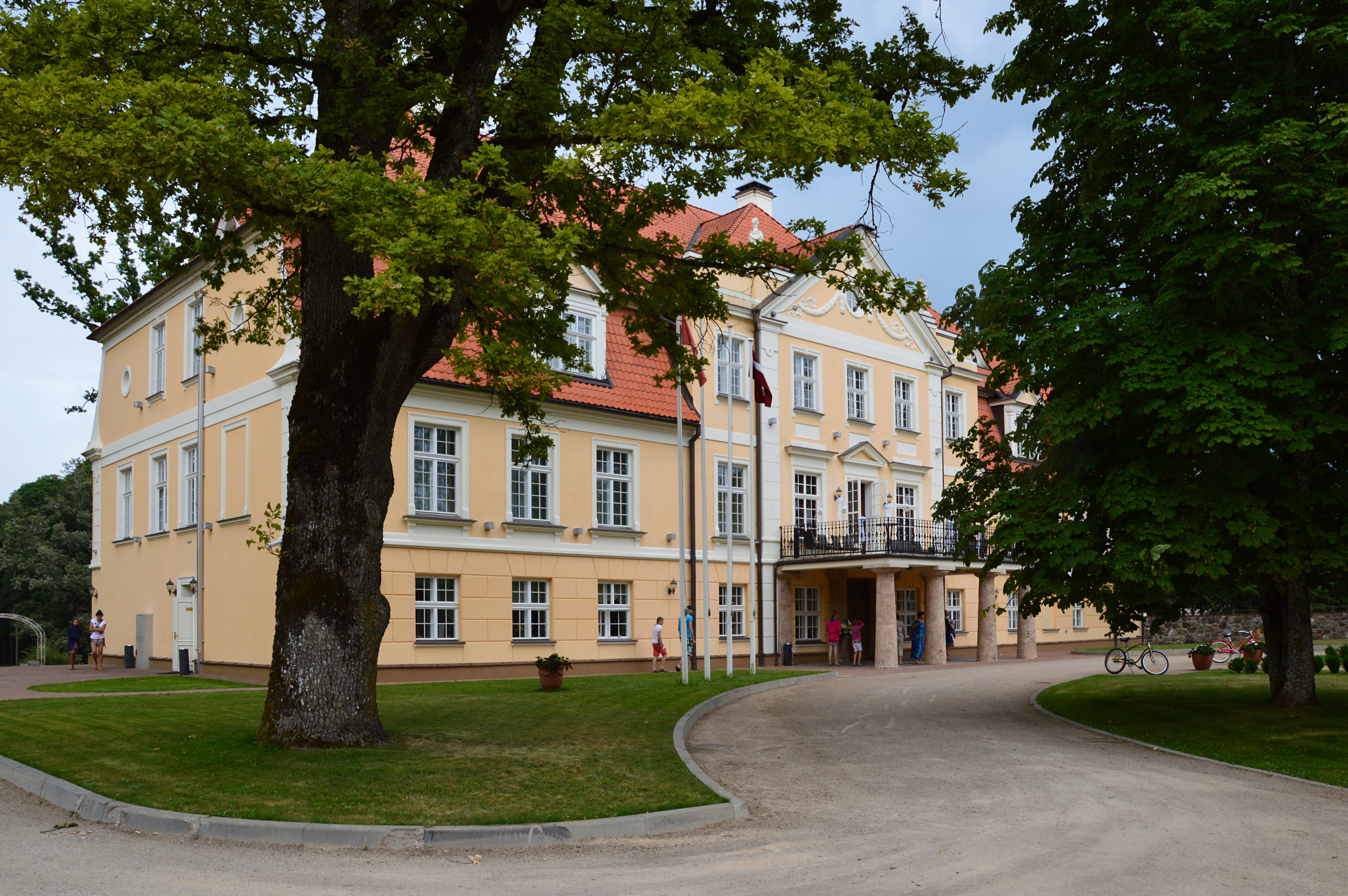 Mālpilsi mõisa peahoone